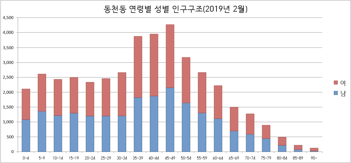 동천동의 연령별,성별로 나눈 그래프이다